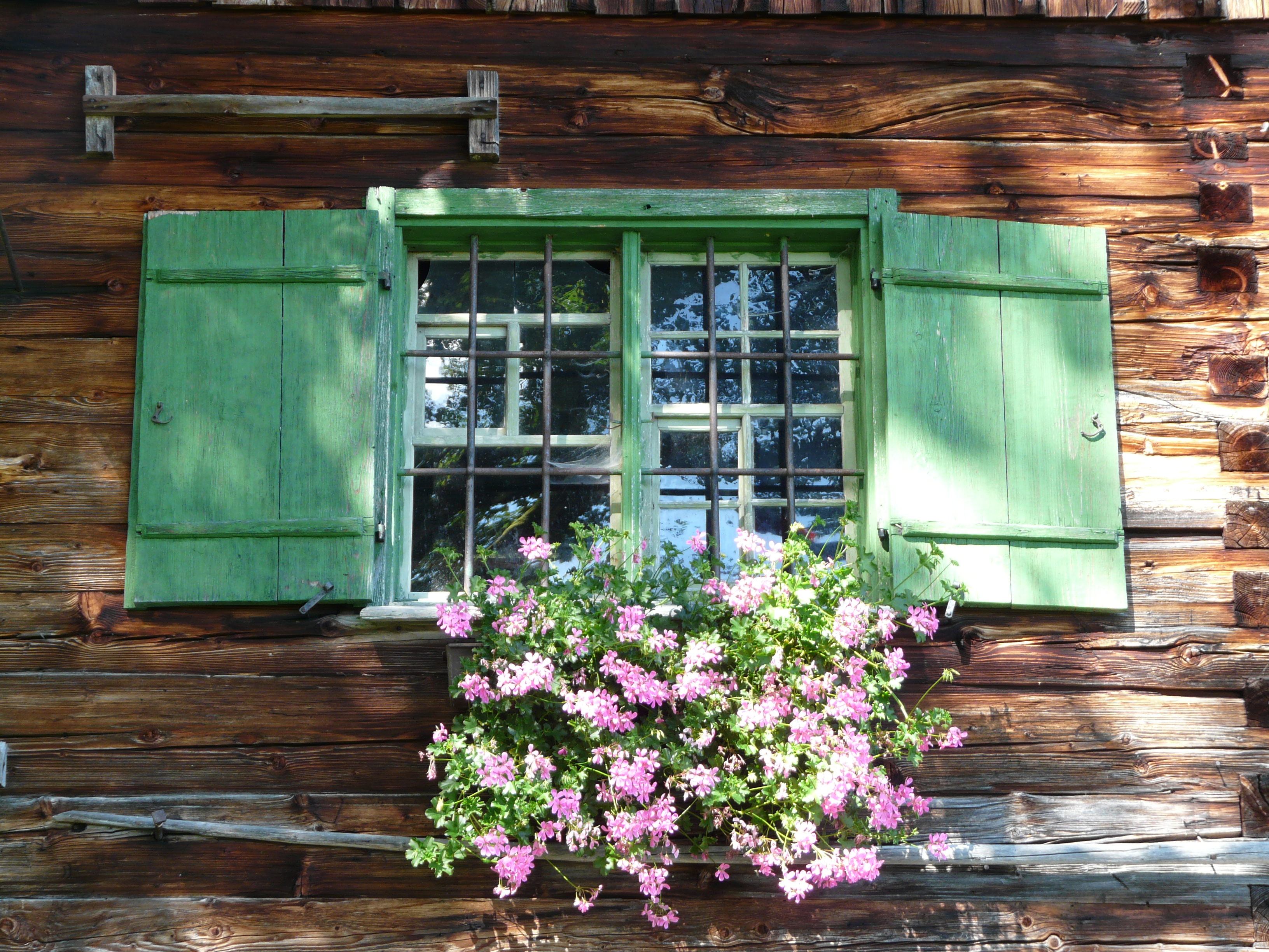 Fenster der Falkenalpe bei Wiesach, Blaichach